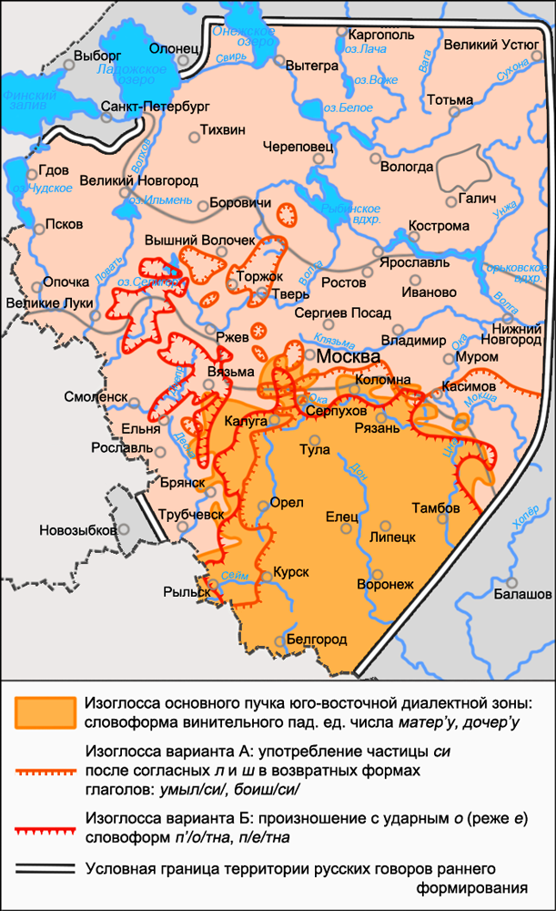 Карта вариантов А и Б основного пучка изоглосс юго-восточной диалектной зоны русского языка. Источники: Захарова К. Ф., Орлова В. Г. Диалектное членение русского языка — 2-е изд. — М.: Едиториал УРСС, 2004. — ISBN 5-354-00917-0, с. 103—104.